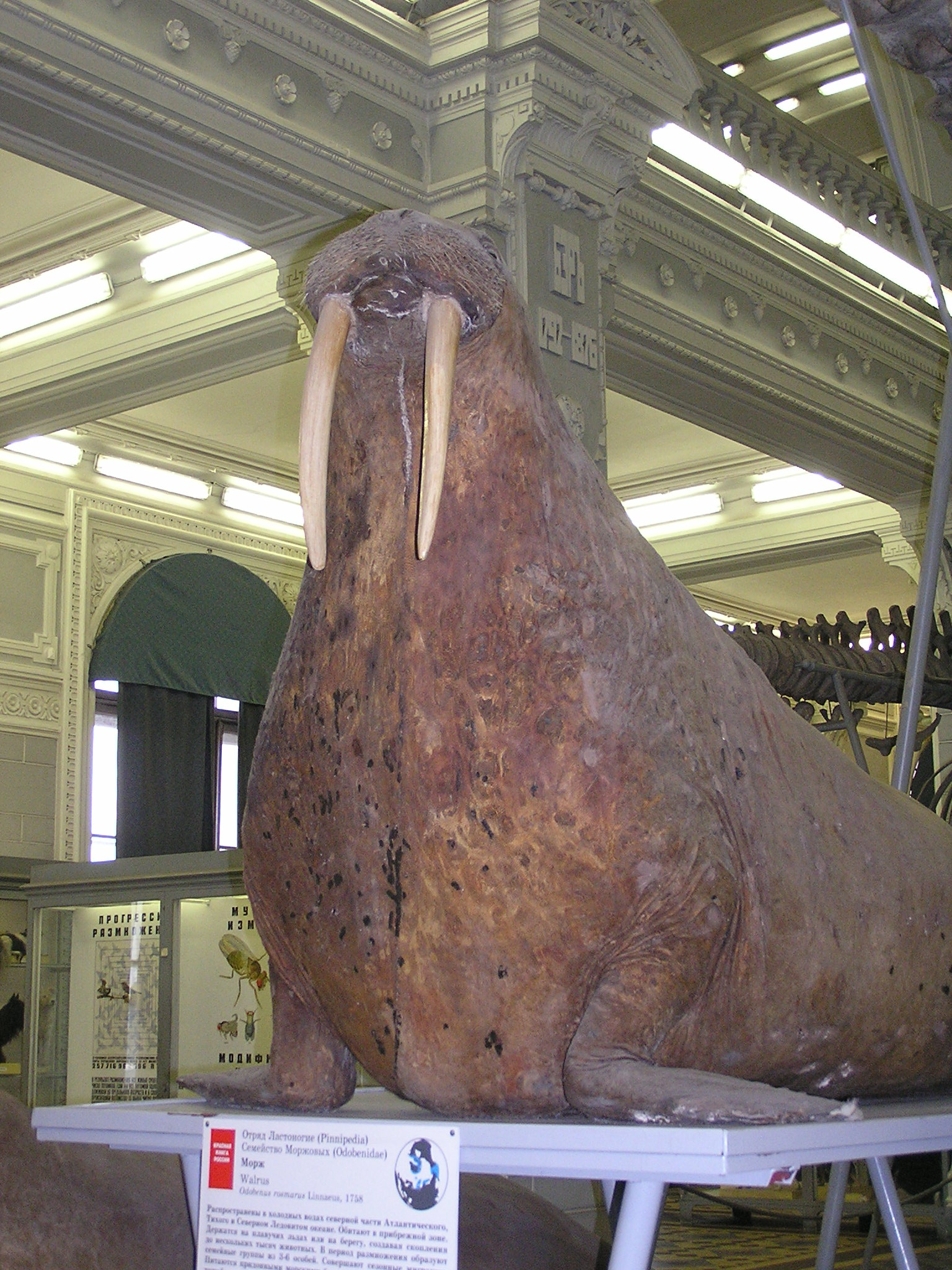 Зоологический музей в Санкт-Петербурге. Морж